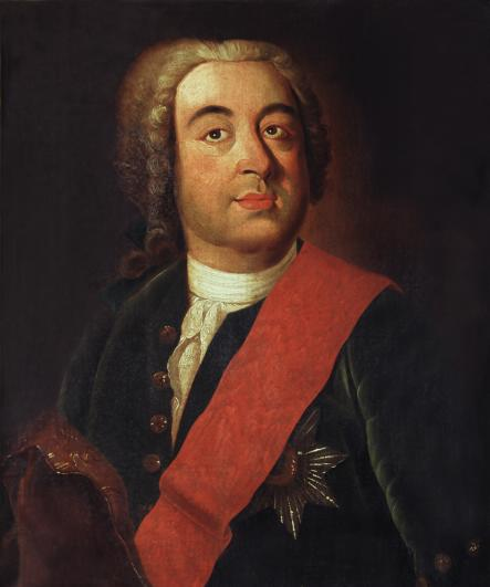 Александр Григорьевич Строганов (1698-1754), барон, генерал-поручик, действительный статский советник. Худ. Франкарт. Кон. 1730-х гг.